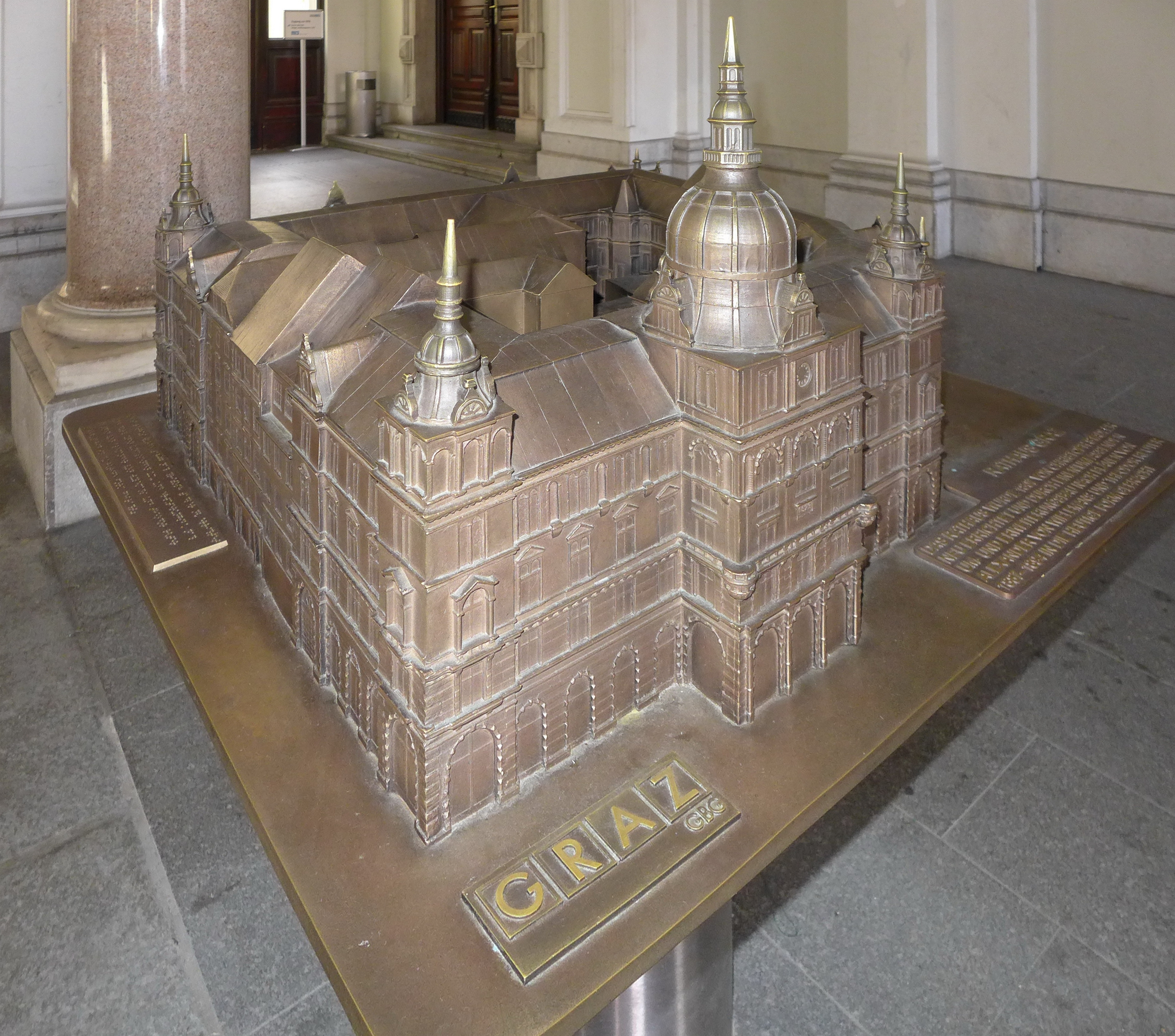 Grazer Rathaus-Miniatur 4